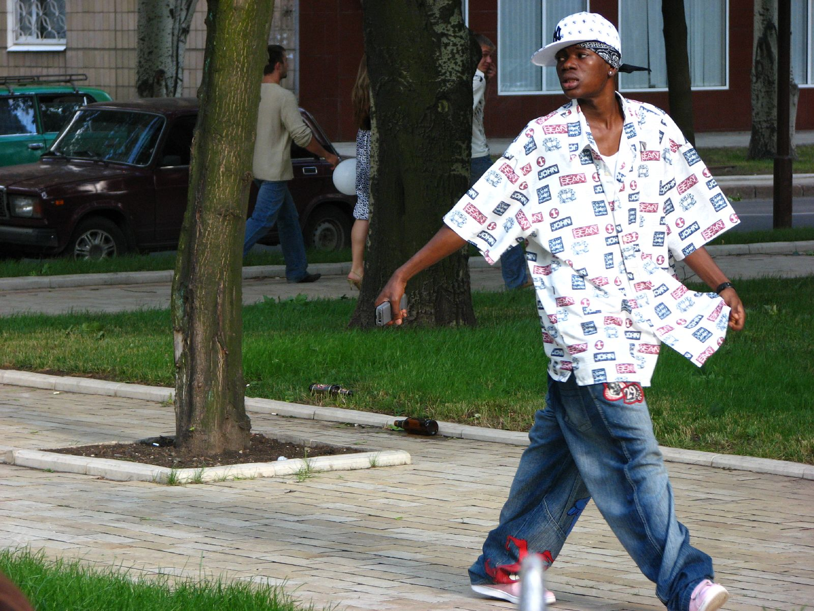 гость с Ямайки, типа